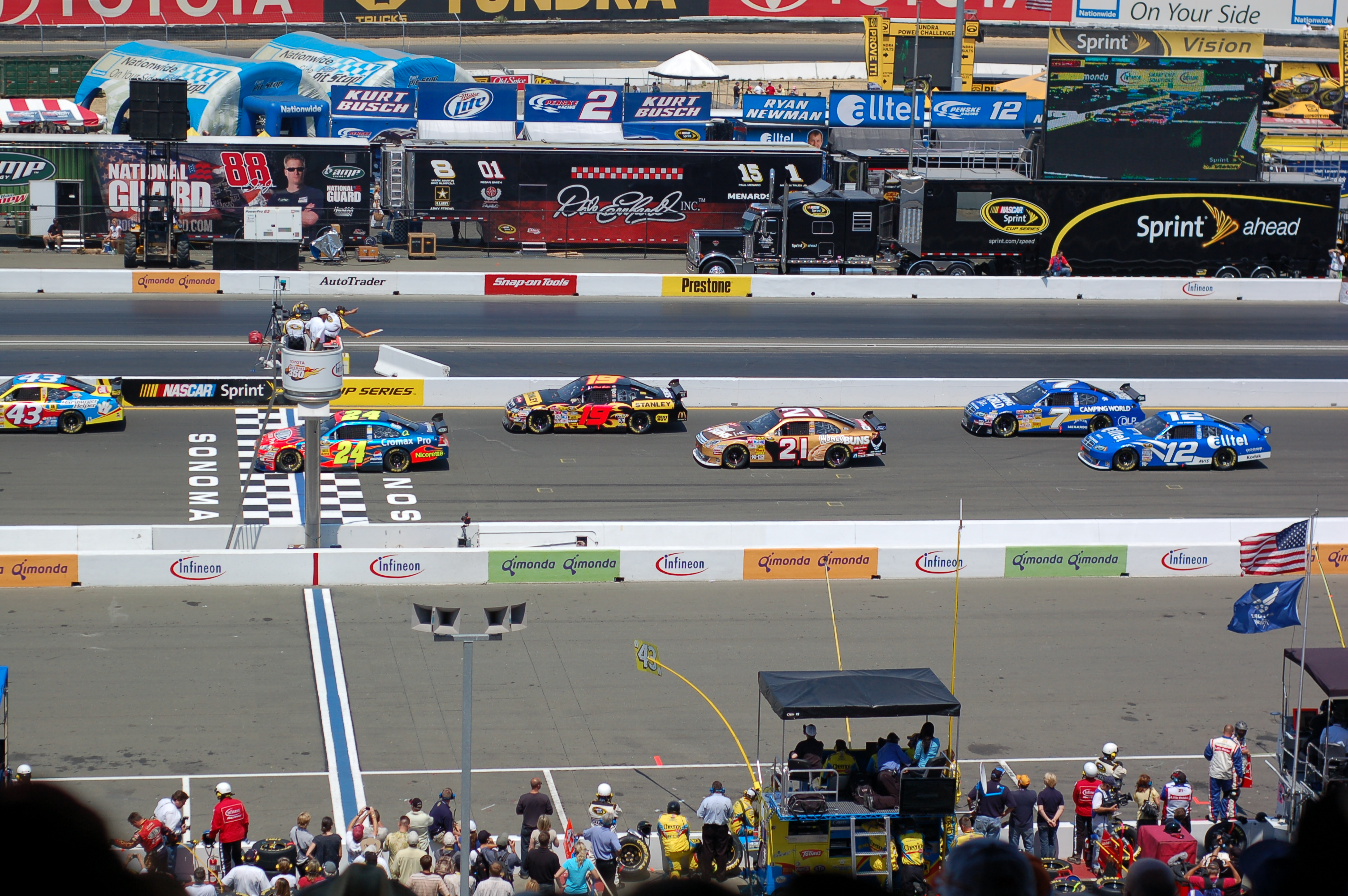 Parade lap